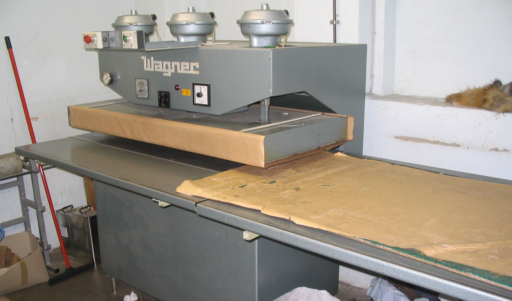 Kürschner-Fixierpresse. Gesehen bei Firma CHR. SCHAD PELZ UND LEDER, Ludwigshafen